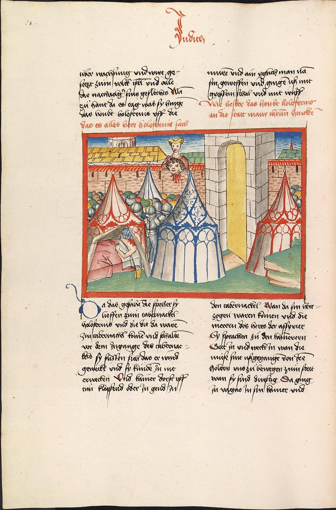 Codex Palatinus germanicus 17, Blatt 257v - Bibel, Altes Testament, Buch Judit: Judit zeigt den Kopf des Holofernes auf der Stadtmauer. (Cpg 17 = Bibel AT, deutsch, Bücher Könige, Chroniken, Esra, Tobias, Judit, Ester, Hiob)